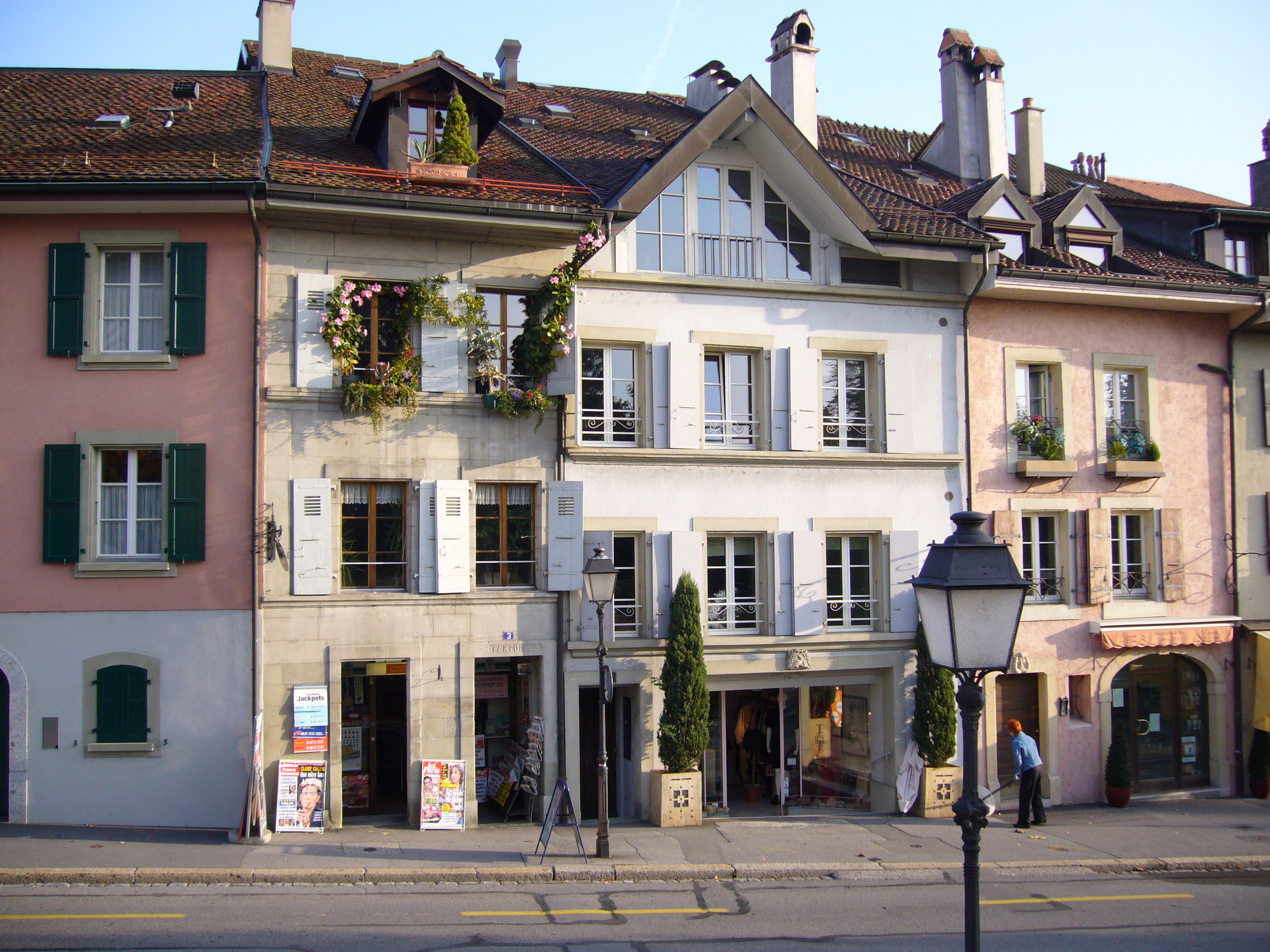 Häuserzeile in Pully, Kanton Waadt